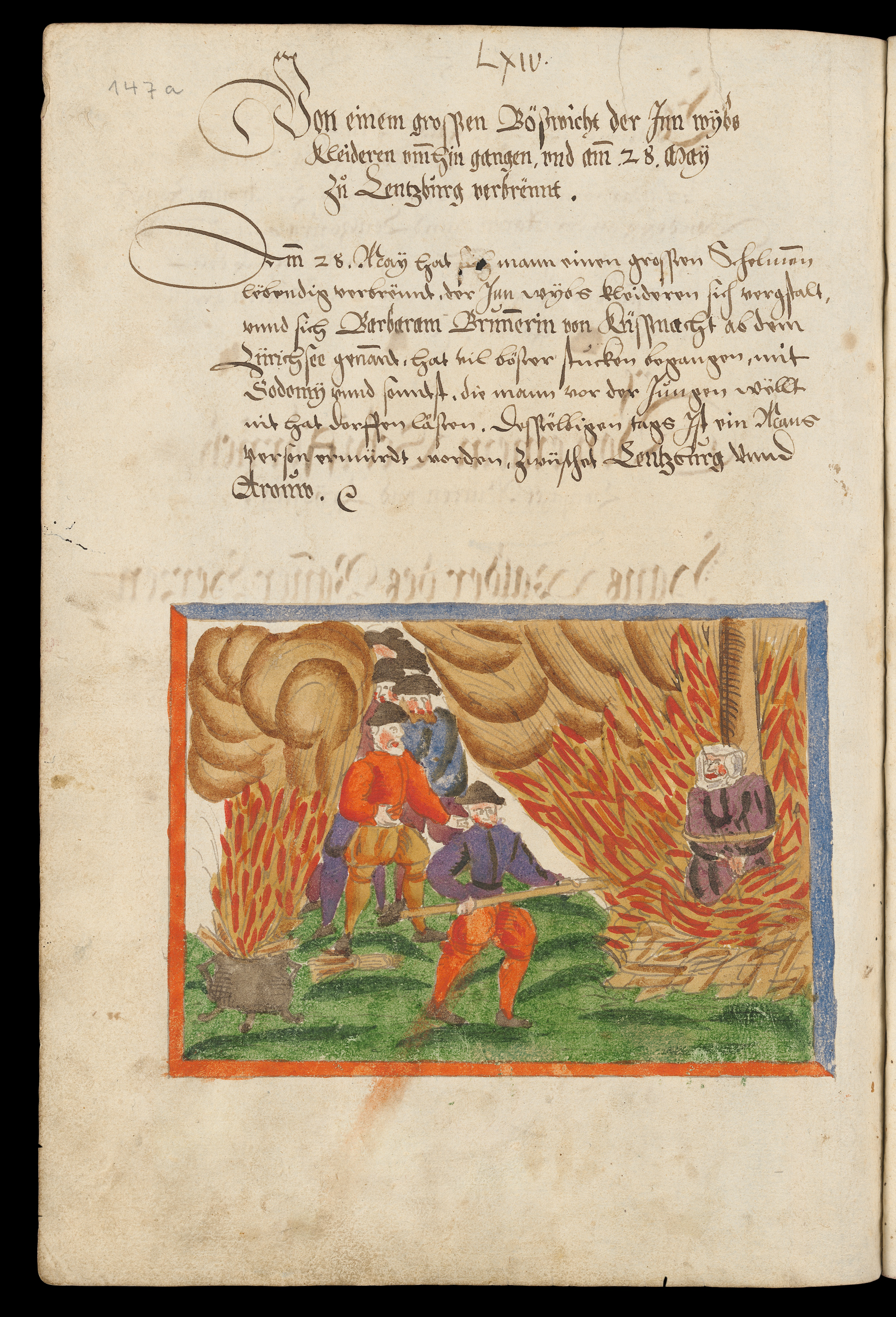 Am 28. Mai wurde ein in Frauenkleidern als Barbara »Brunner auftretender Mann in Lenzburg verbrannt. Gleichentags wurde ein Mann zwischen Lenzburg und Aarau wegen Sodomie ermordet« aus Johann Jakob Wick: Sammlung von Nachrichten zur Zeitgeschichte aus den Jahren 1560-87 (mit älteren Stücken), Handschrift [1]